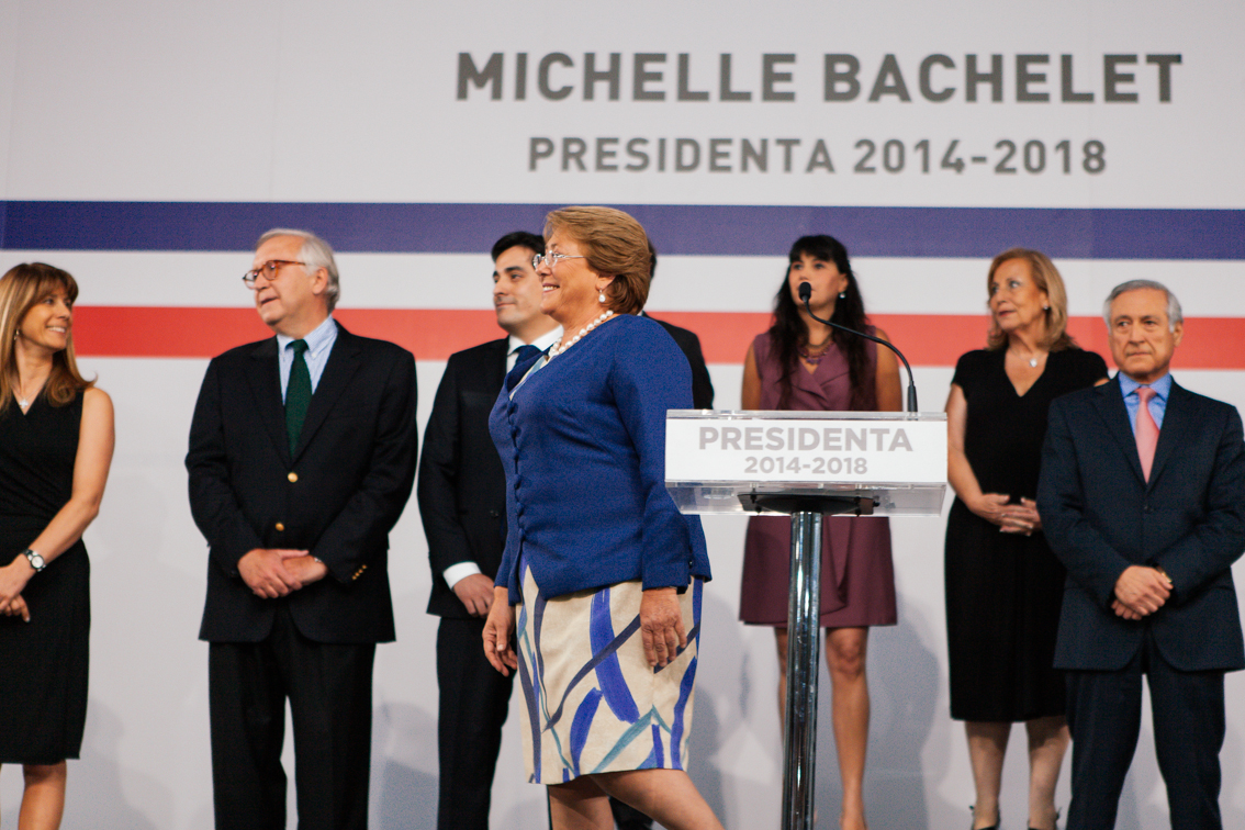 Presentación del gabinete ministerial por la presidenta electa Michelle Bachelet.